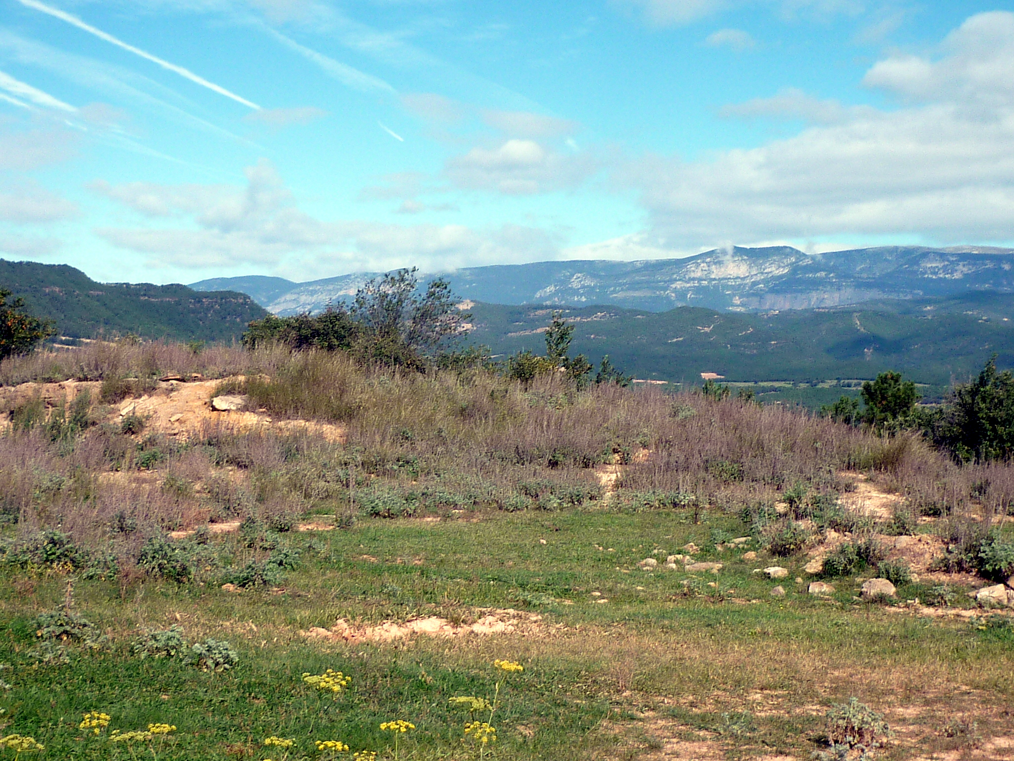 Masia de Puiggalí (Olius): els enderrocs senyalen el lloc on s'aixecava la masia